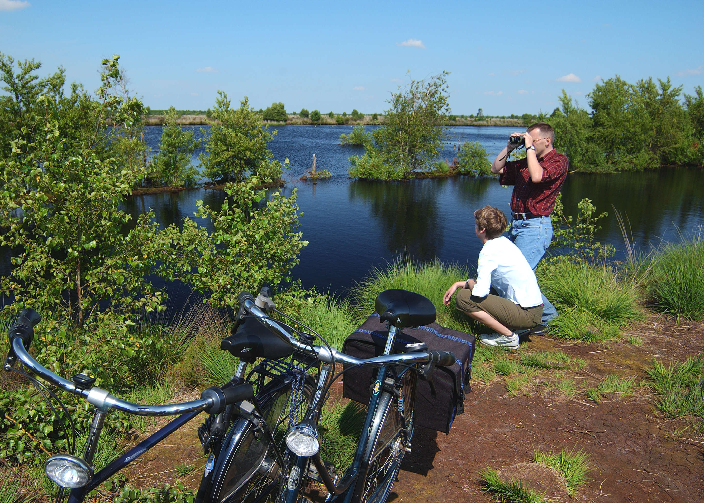 Aussicht auf das Bourtanger Moor-Barberveen